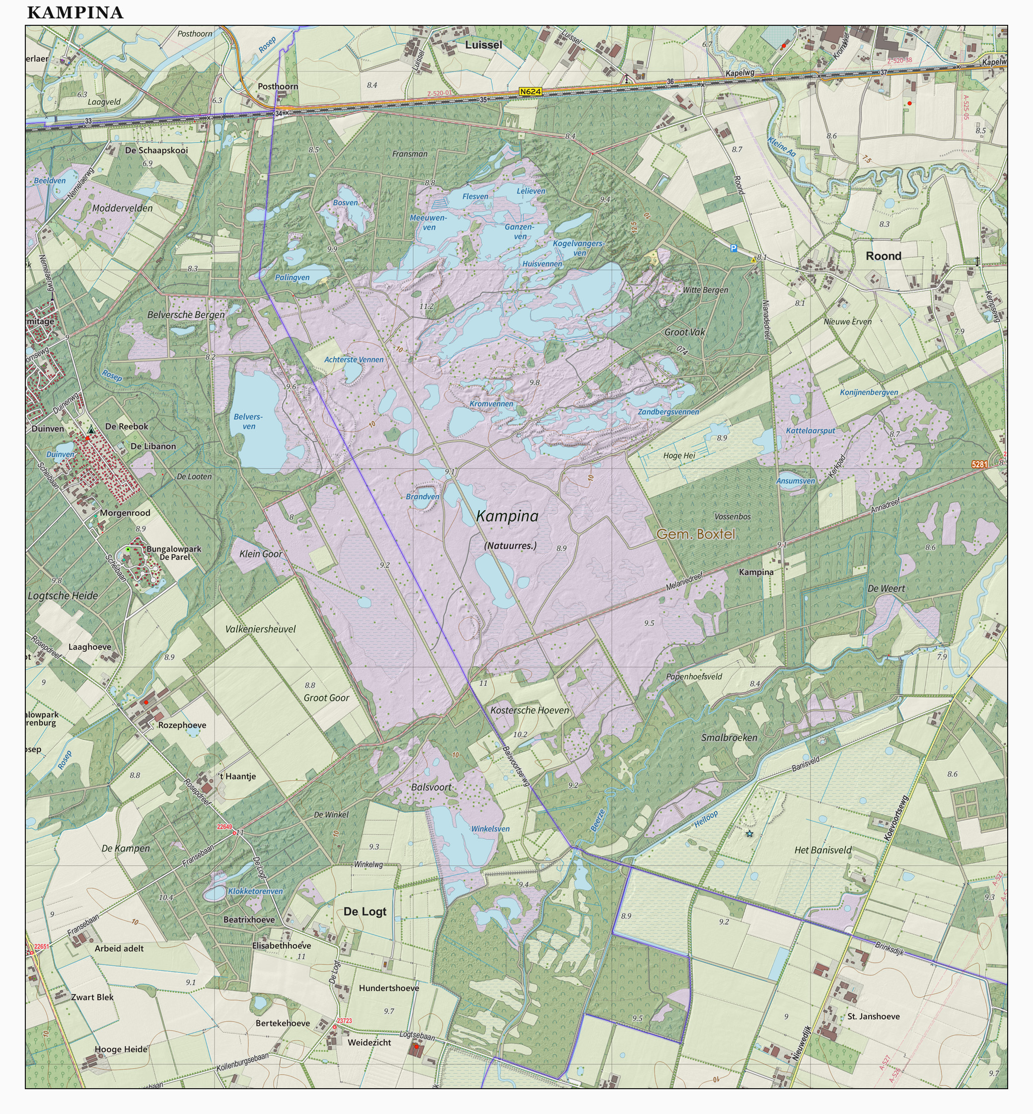 Topografische kaart van Kampina (natuurgebied). Resolutie: 400 pixels/km. Zie ook de Legenda. Zie ook de Legenda.